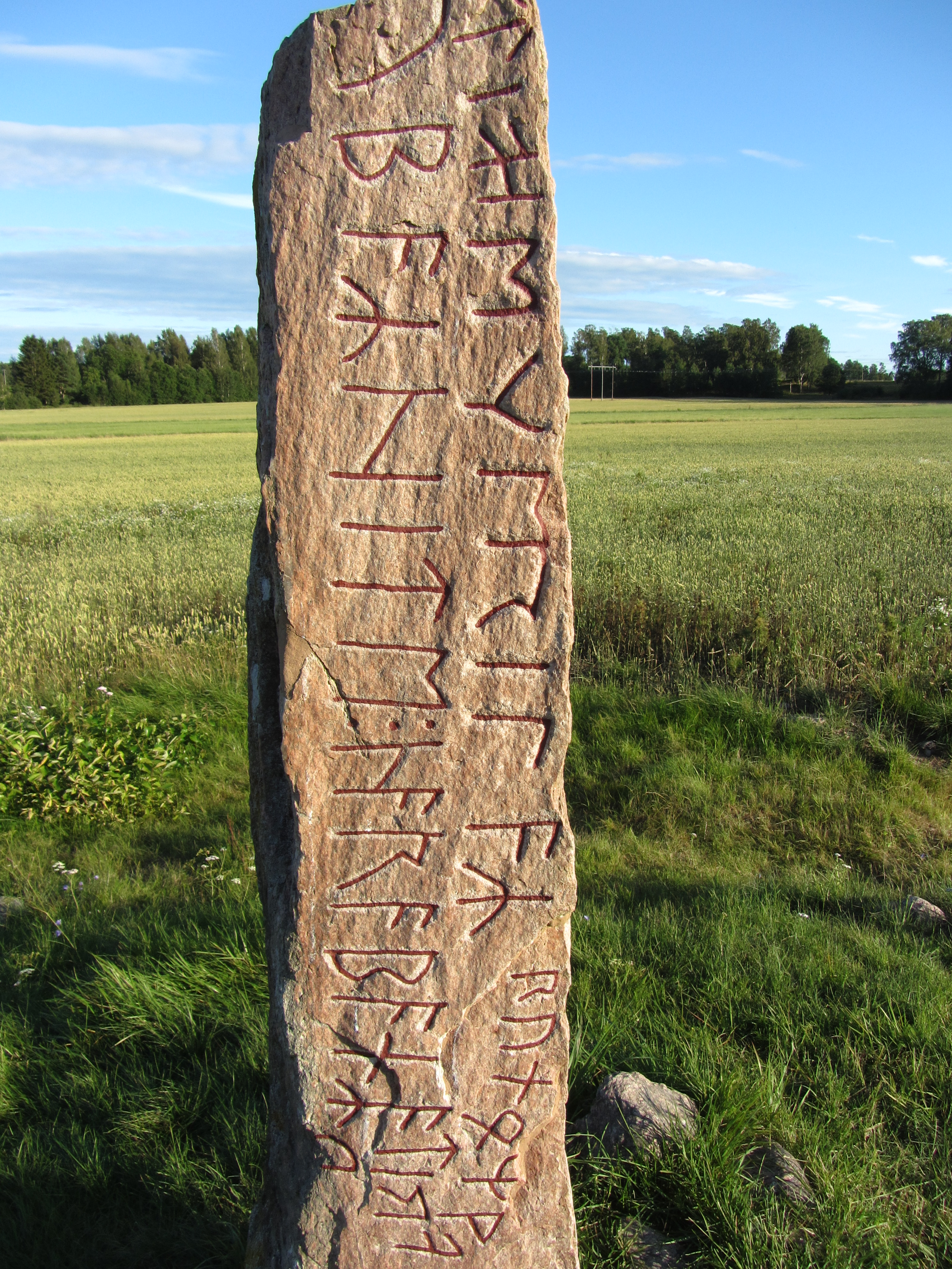 Runstenen i Järsberg, strax söder om Kristinehamn (ett par km) i sydöstra Värmland (Varnums socken, Ölme härad)